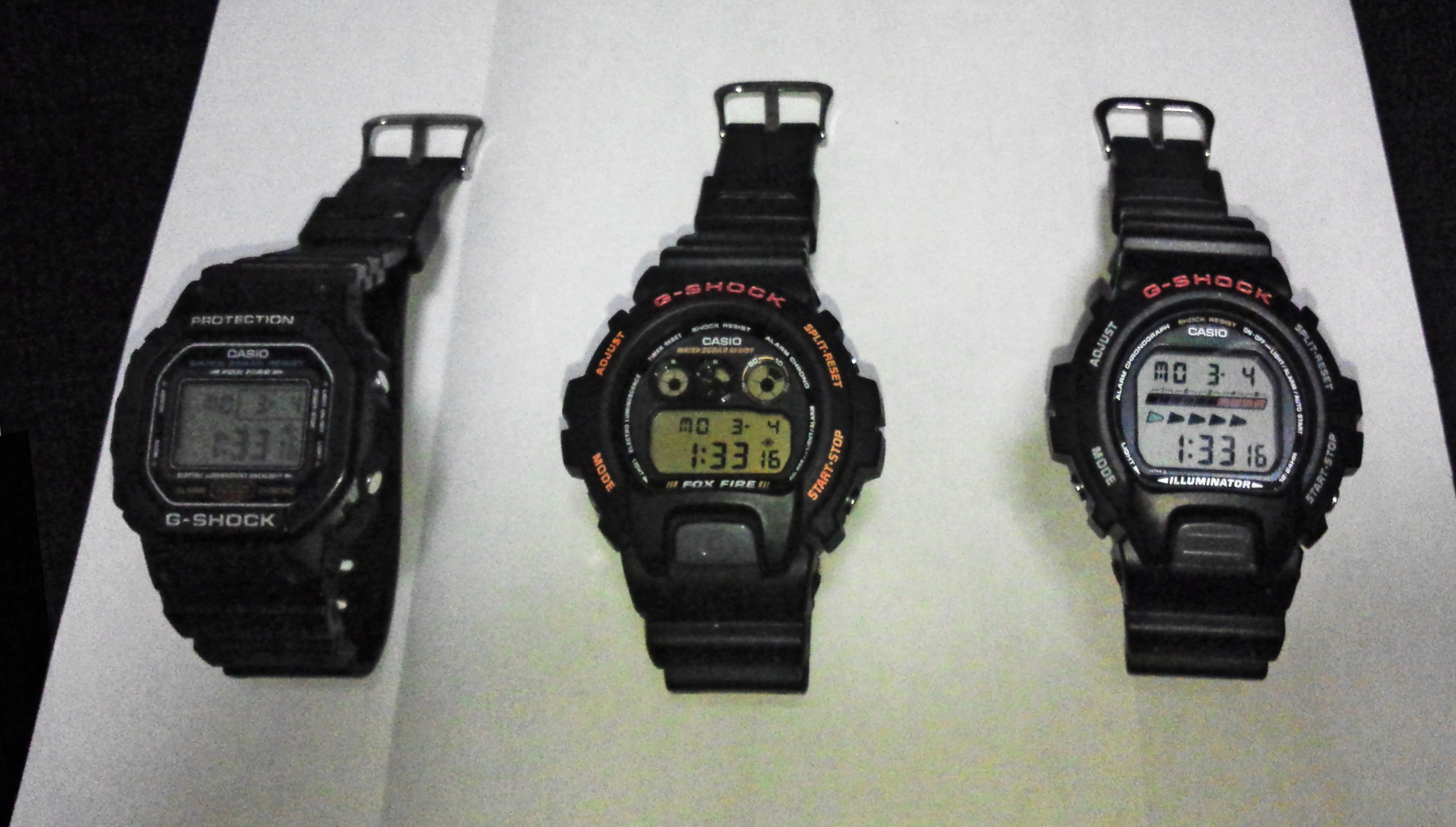 撮影者本人が所有しているデジタルウォッチです。